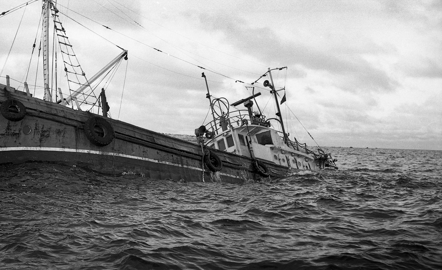 Päästetööd merel 74